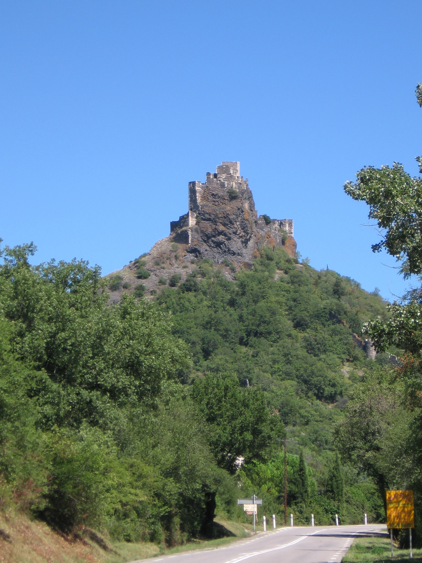 castel near Rochemaure, Montelimar (08/2006)